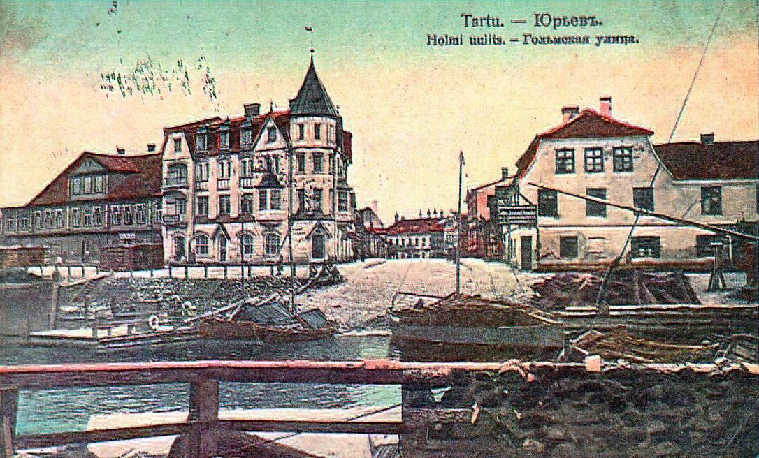 Tartu endine Holmi uulits Ülijõel